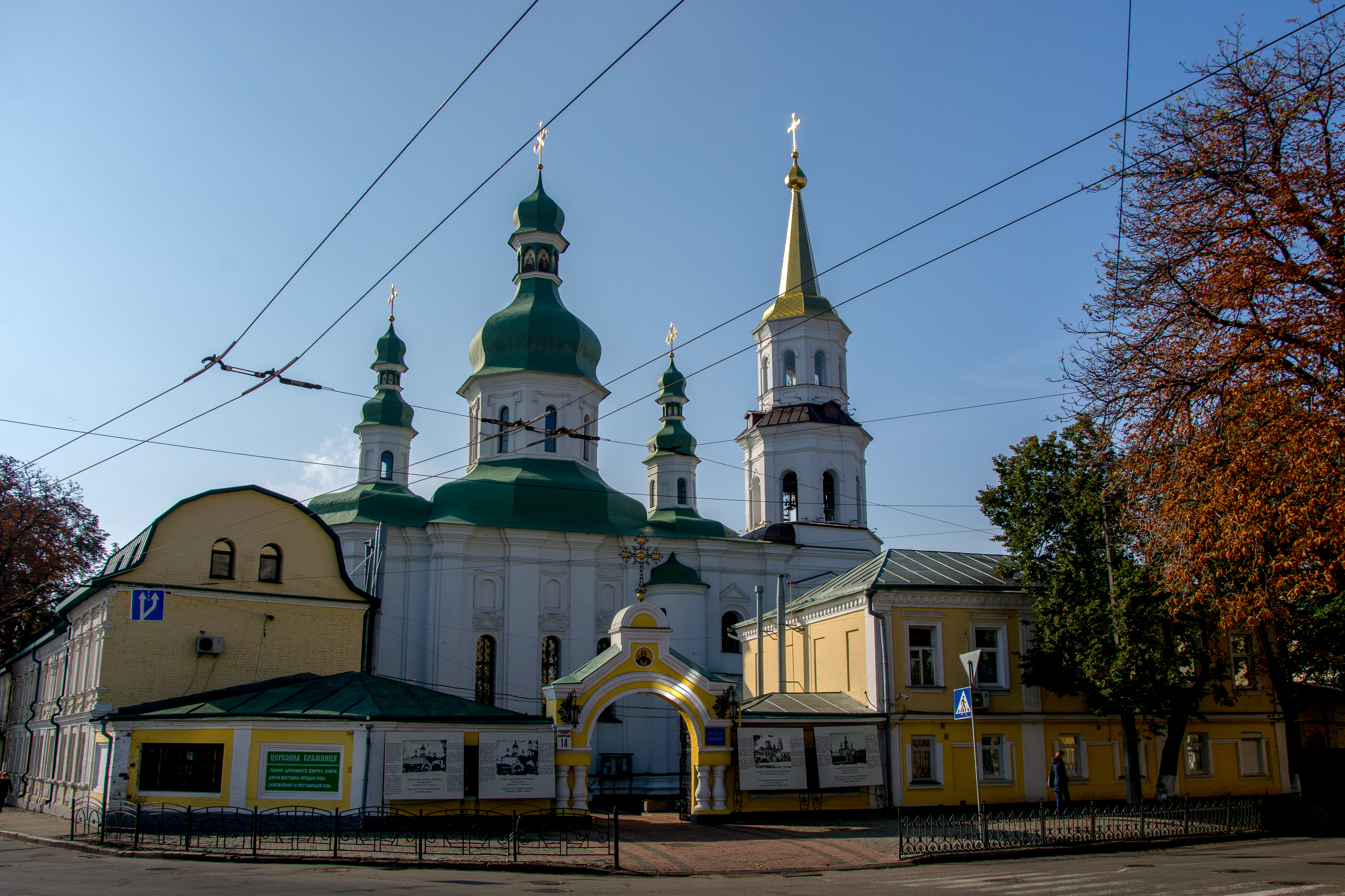 Комплекс споруд церкви Феодосія Печерського, Київ, Лаврська вул., 14